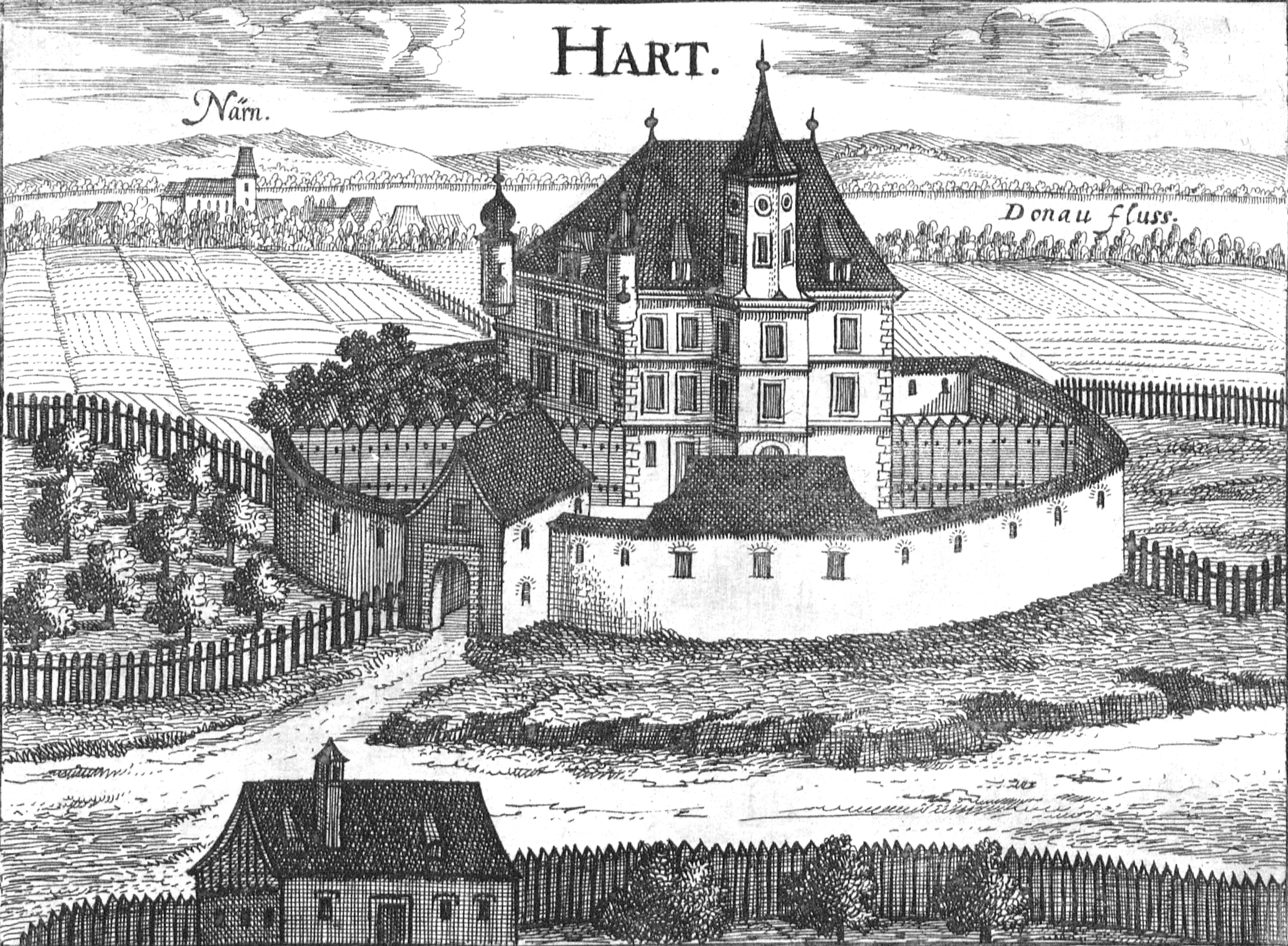 Ansicht von Hart in Naarn (Harter Schlössel). Kupferstich von Georg Matthäus Vischer